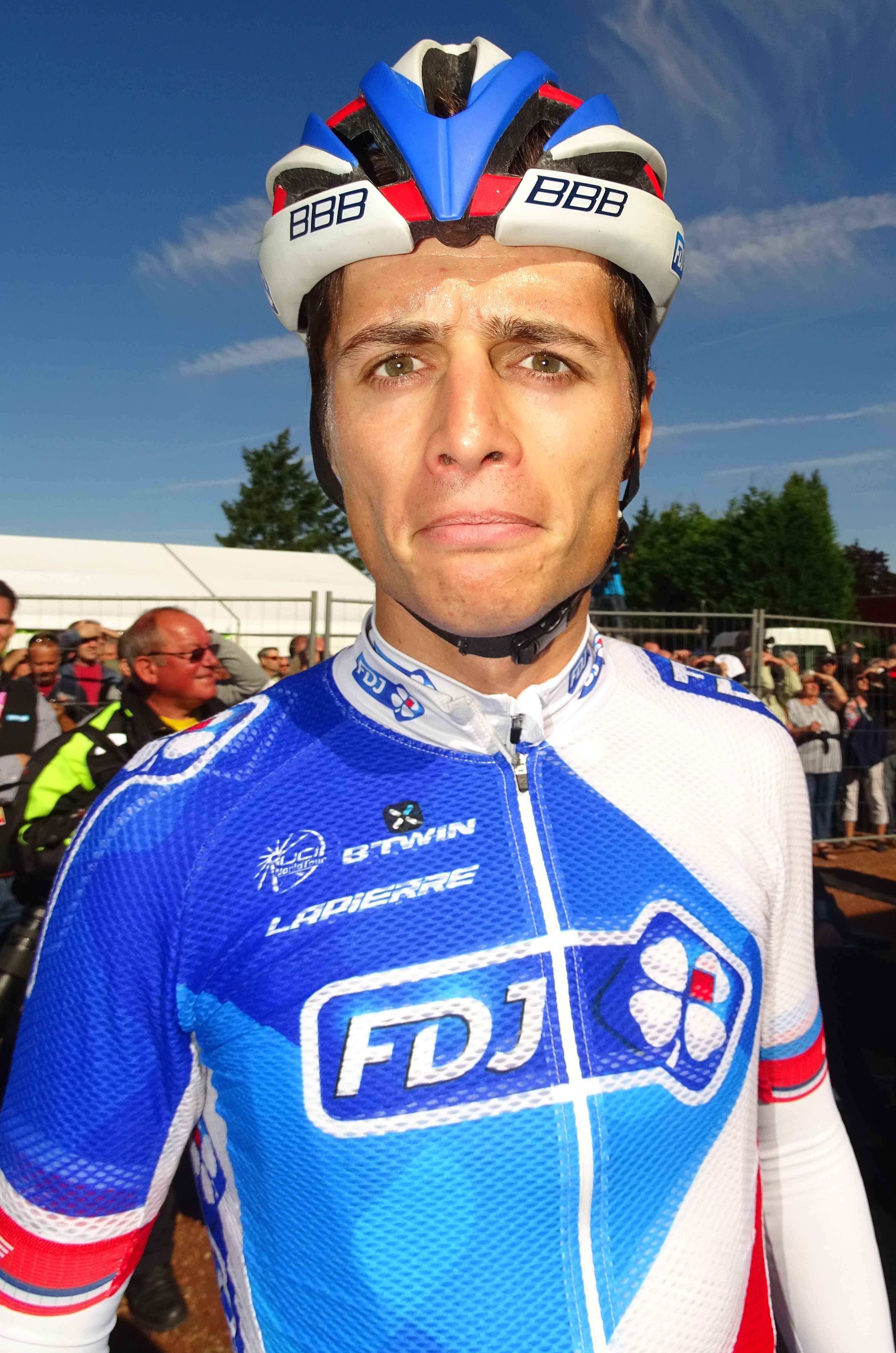 Reportage réalisé le dimanche 20 septembre à l'occasion du départ et de l'arrivée du Grand Prix d'Isbergues 2015 à Isbergues, Nord-Pas-de-Calais, France.